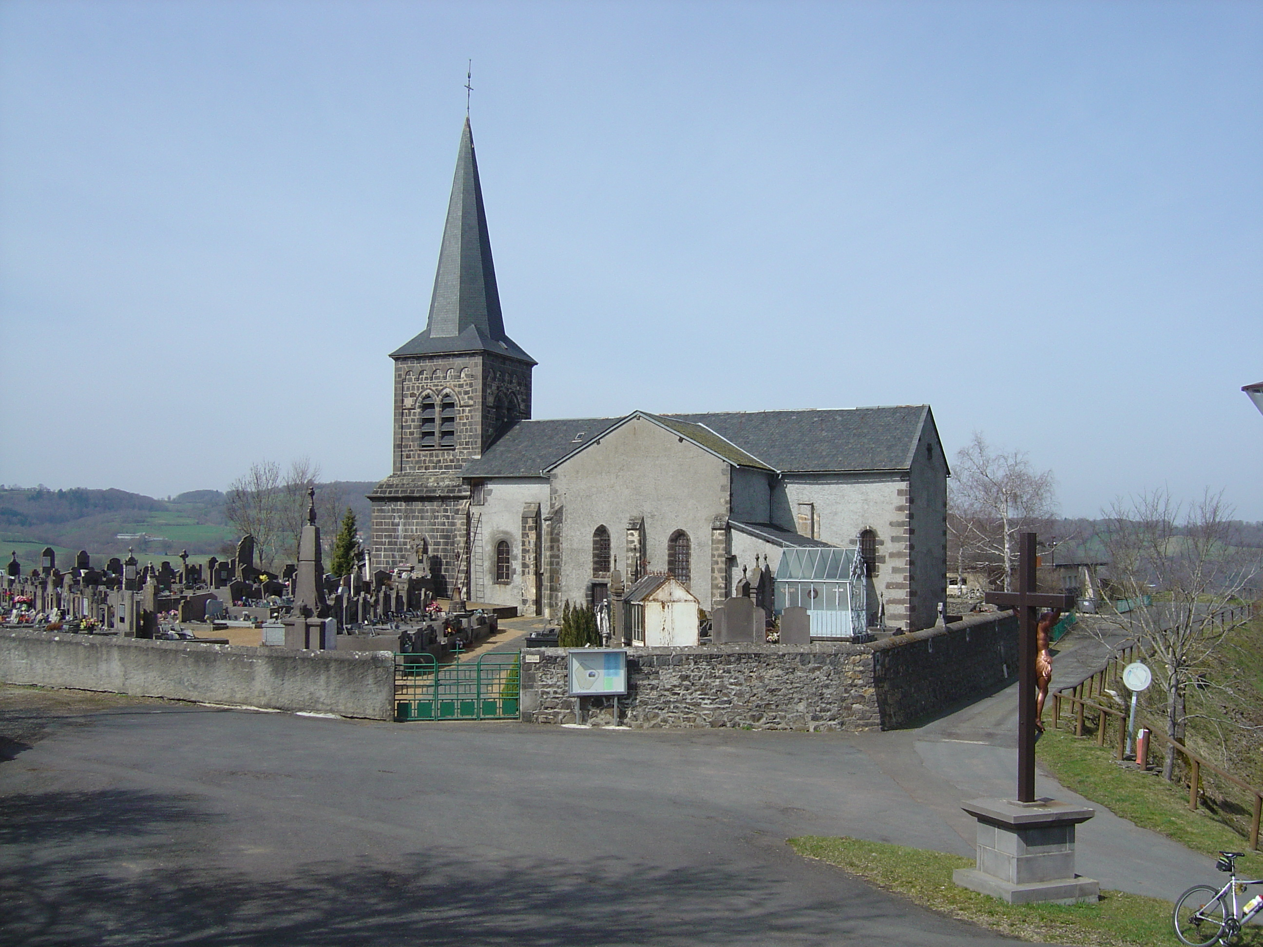 Cimetière et Eglise du XIème siècle à Saint-Pierre le Chastel. Auvergne; Puy-de-Dôme (63)